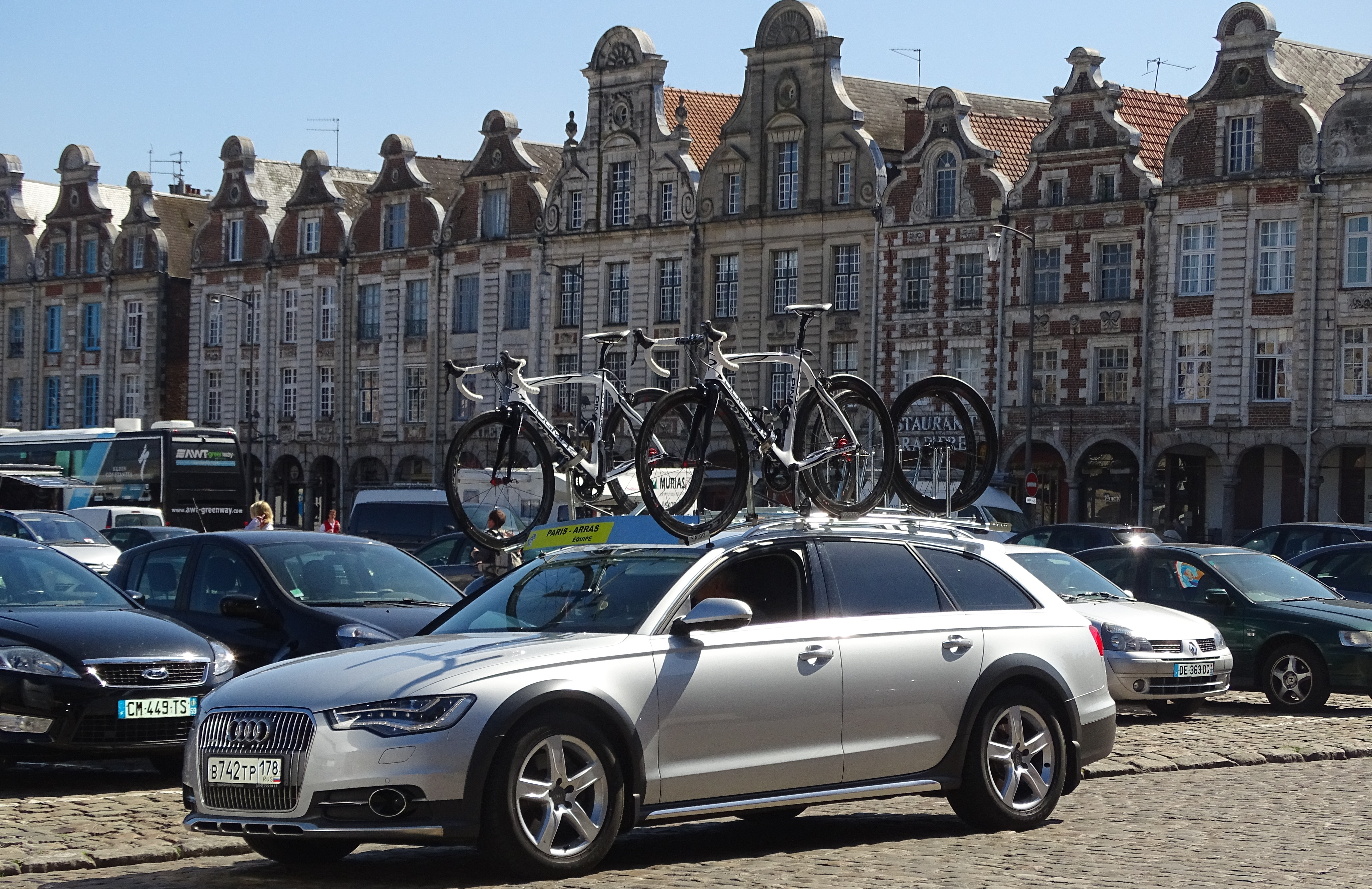 Reportage réalisé le dimanche 24 mai 2015 à l'occasion du départ et de l'arrivée de la troisième étape du Paris-Arras Tour 2015 à Arras, Pas-de-Calais, Nord-Pas-de-Calais, France. Depicted team: Lokosphinx